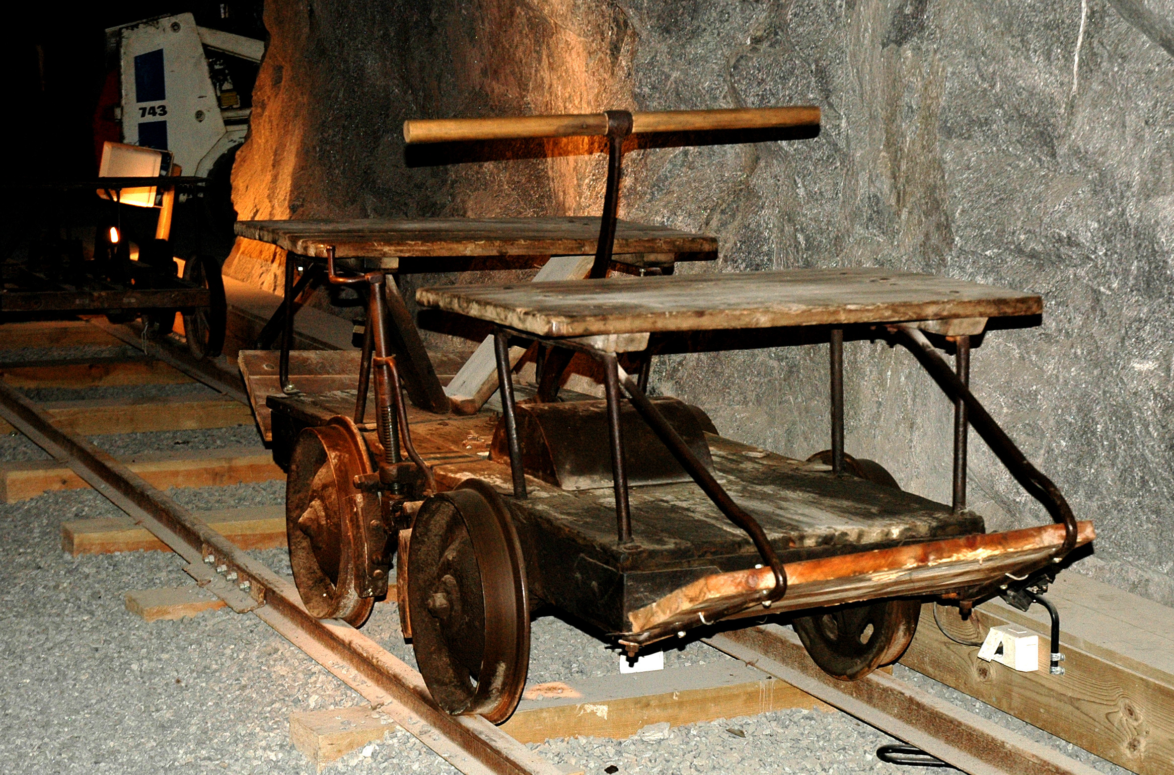 Dresin, 'Kongens gruve', ' the Kings Mine, Kongsberg, Norway